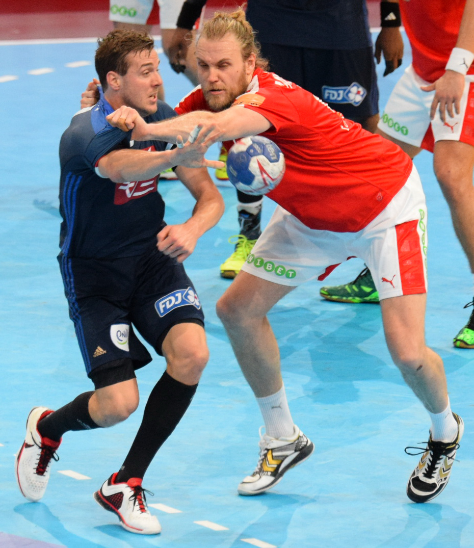 Le 10 janvier 2016 lors du match France / Danemark durant la Golden League à l'AccorHotels Arena (Paris).